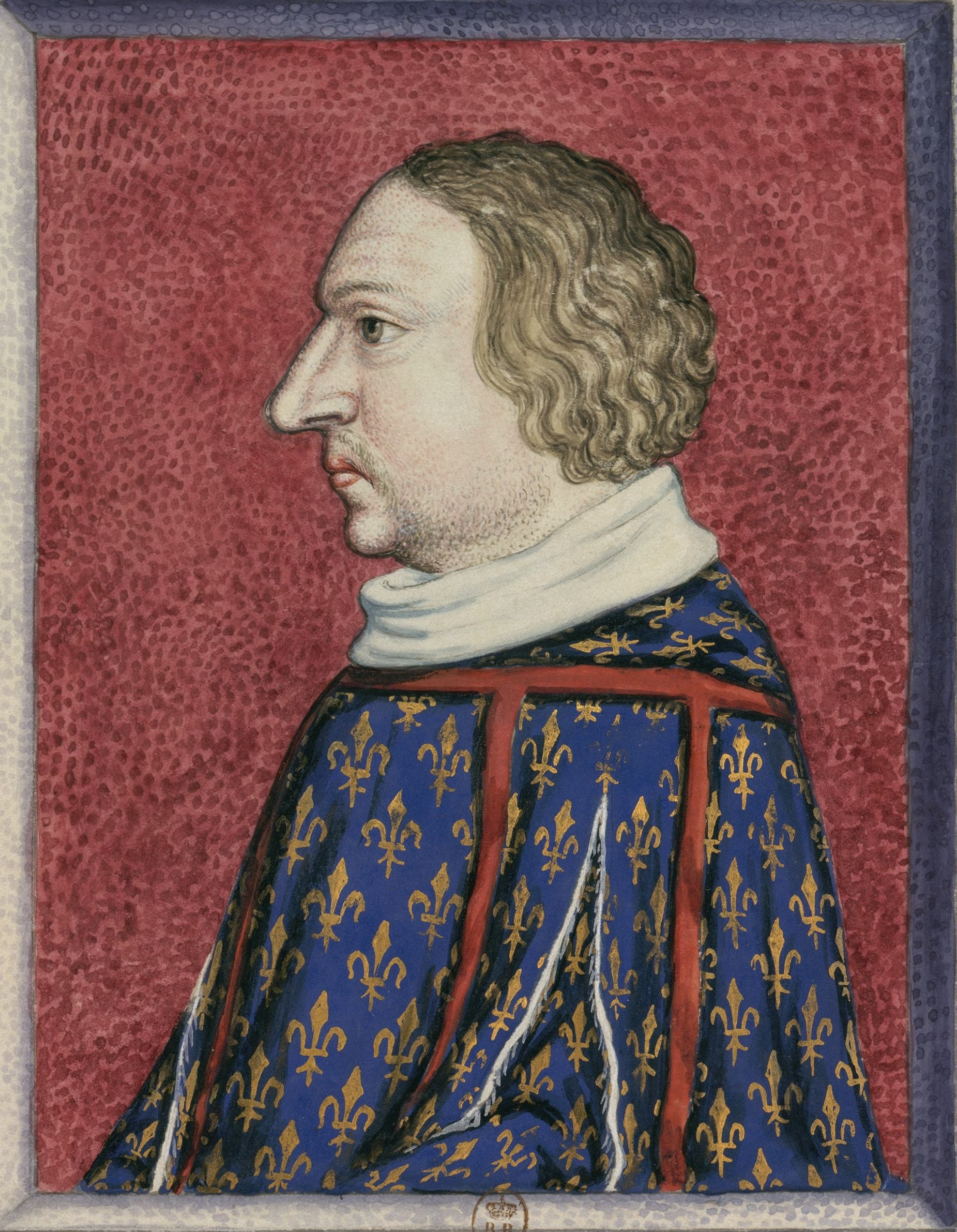 Portrait de Louis Ier de France, duc d'Anjou, de profil, portant une tunique bleue fleurdelisée au lambel de gueules. Paris, Bibliothèque nationale de France, Fonds Roger de Gaignières, XVIIe siècle, copie d'un original disparu ?